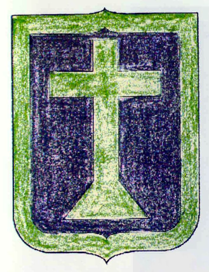 COFRADÍA DE LA SANTA VERA CRUZ. VILLAFRANCA DE LA SIERRA (ÁVILA; ESPAÑA)